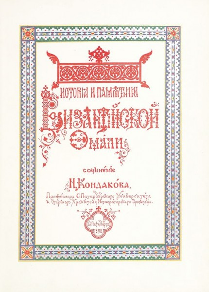 титульный лист книги "Византийские эмали Звенигородского"